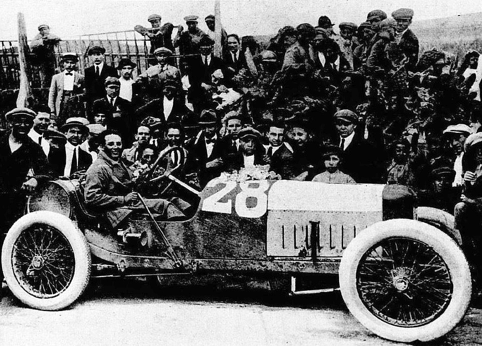 Giulio Masetti vainqueur de la Targa Florio 1921 sur Fiat S5714B, Le Monde illustré du 11 juin 1921, p.441